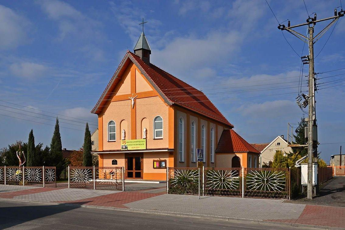 Kościół Podwyższenia Krzyża Świętego